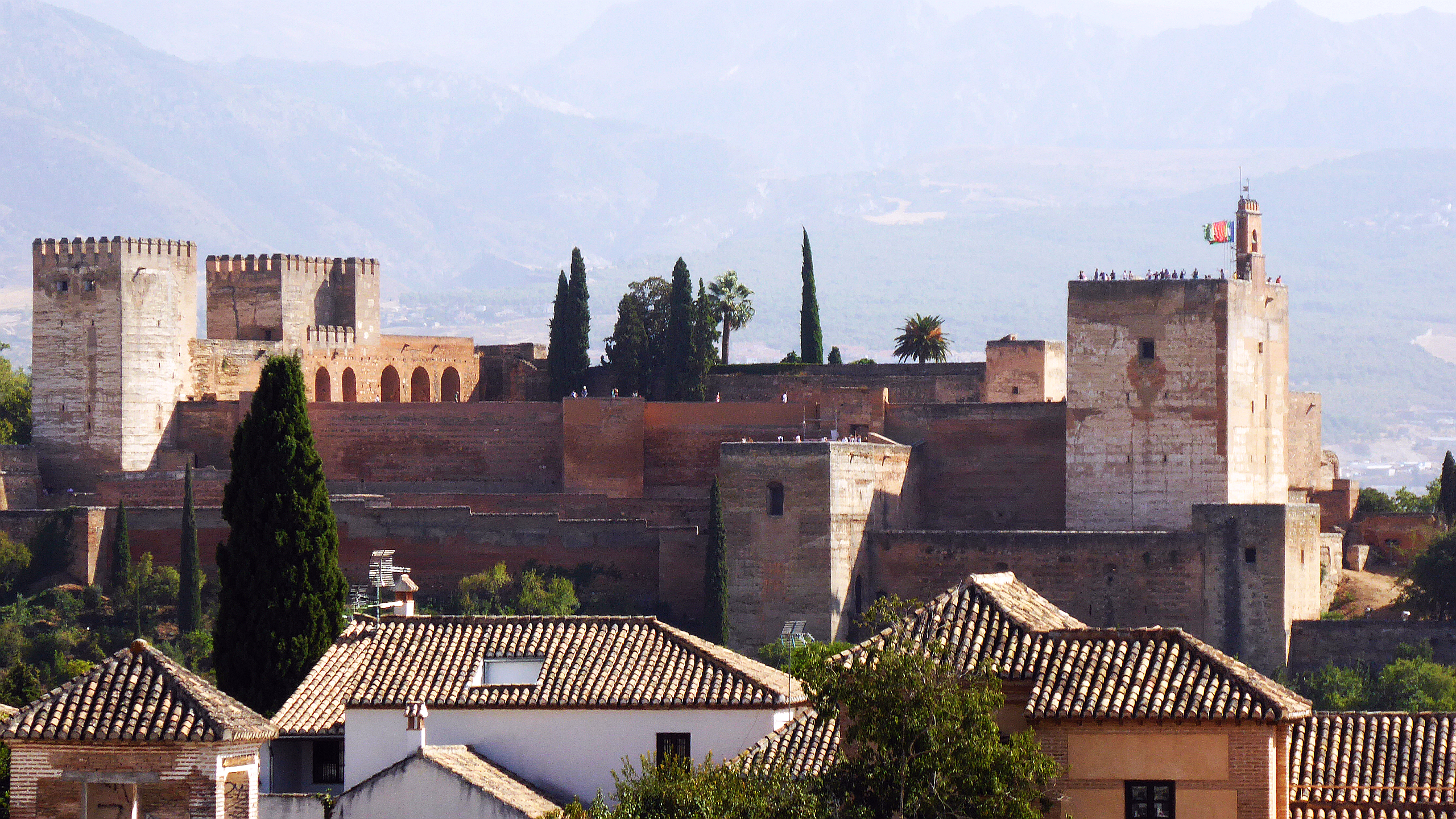 Alcazaba de Benedín, westlichster Teil der Alhambra, maurische Burganlage. Der ganze Komplex hat eine Fläche von 140.000m², gelegen in der Stadt Granada in Andalusien Spanien Foto Wolfgang Pehlemann P1100589